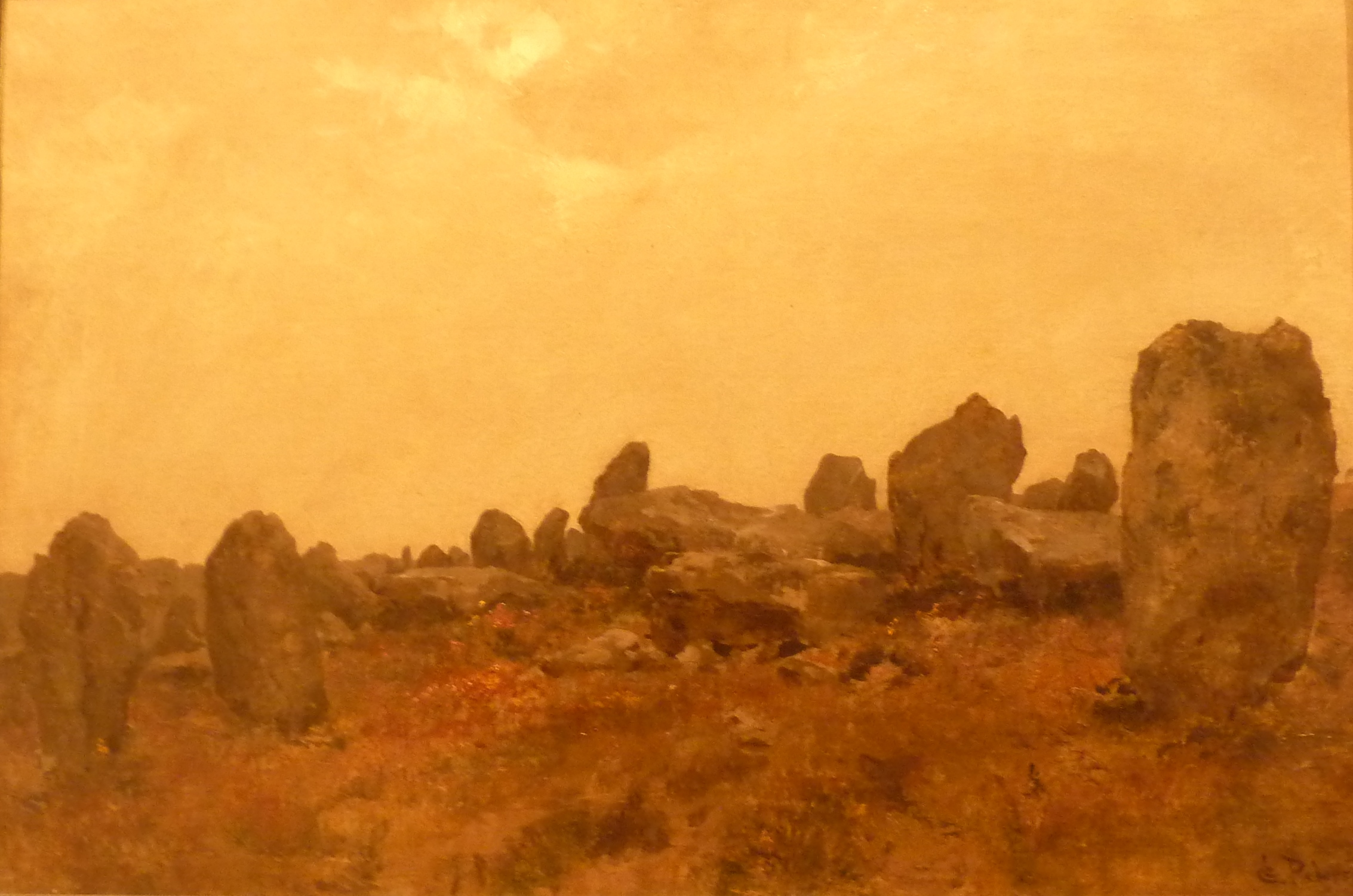 Léon Germain Pelouse: Les pierres de Carnac (huile sur toile, non daté, Conseil général du Morbihan, Musée des beaux-arts de Vannes)